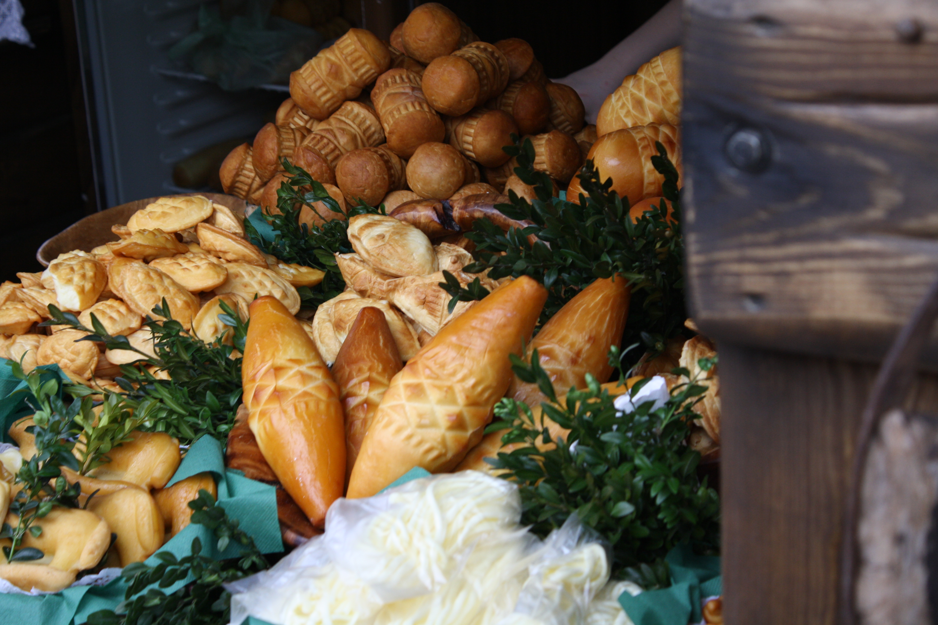 sery góralskie - na pierwszym planie oscypki